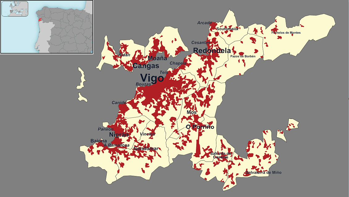 Área metropolitana de Vigo, Galicia, España. Tipografía de los municipios con tamaño proporcional al número de habitantes de los mismos. En cursiva otras aglomeraciones importantes que no son municipios independientes.